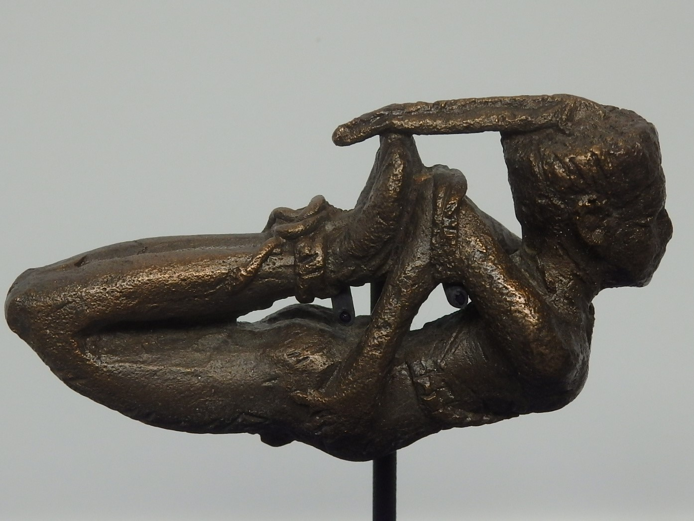 Bronzefigur eines gefesselten nubischen Königs, 1. Jh. v. Chr., British Museum EA 65222